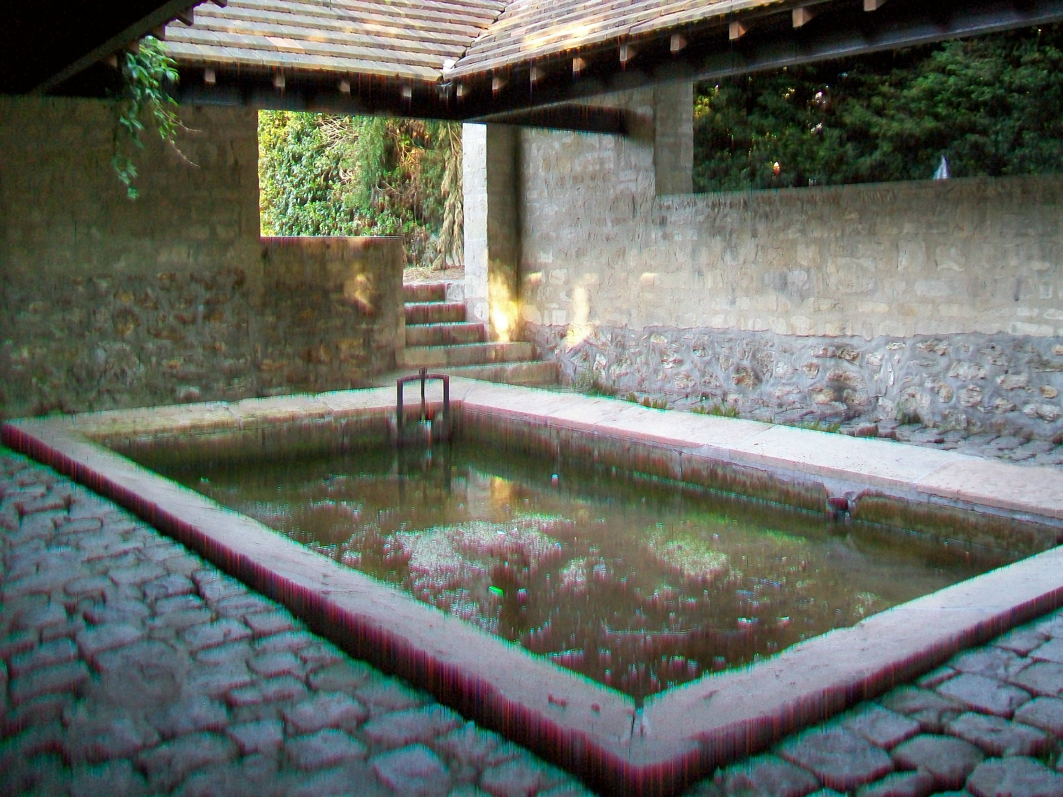 Intérieur du lavoir de la fontaine Rousselette, sentier de la Rousselette.